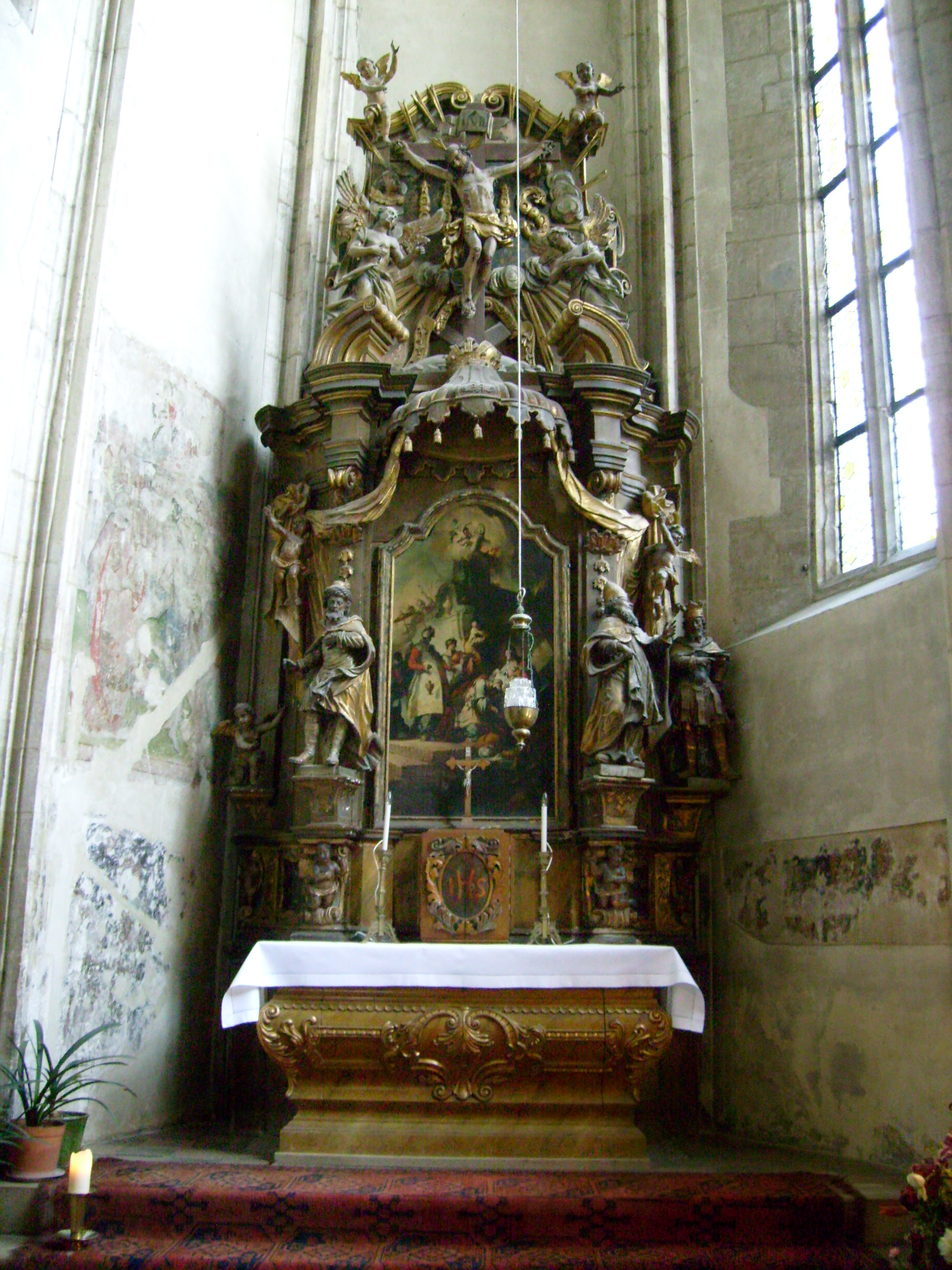 Johannes Nachtigall (1717-1761), Klausenburger Michaelskirche. Der Dreikönigsaltar.